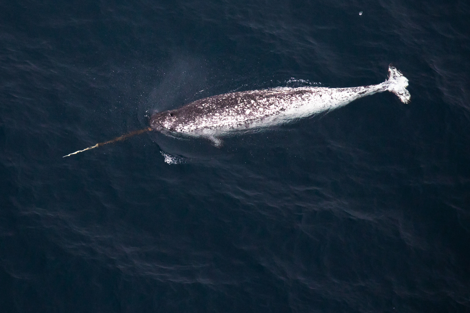 Нарвал у островов Карла-Александра и Джексона (северная часть архипелага Земля Франца-Иосифа), июнь 2019